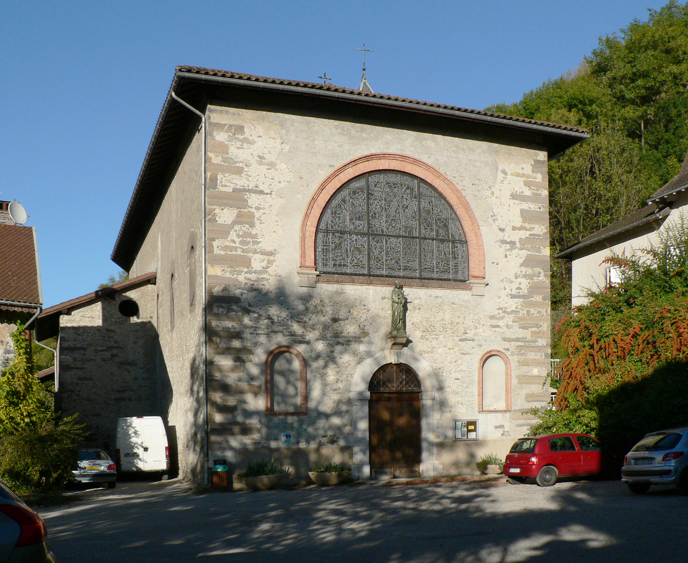 église Saint-Jean-Baptiste à Tencin, Isère, France.